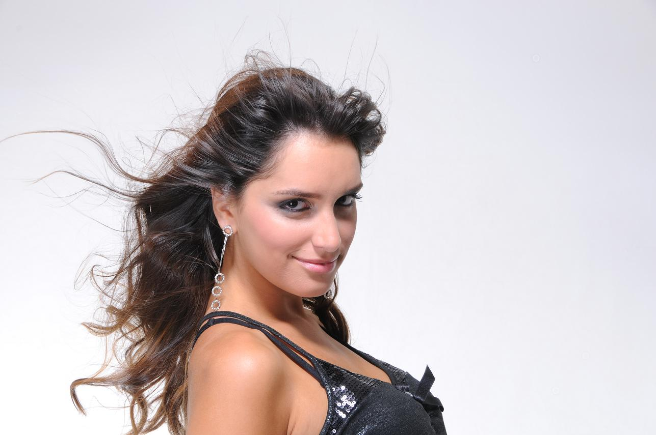 Ensaio 2009